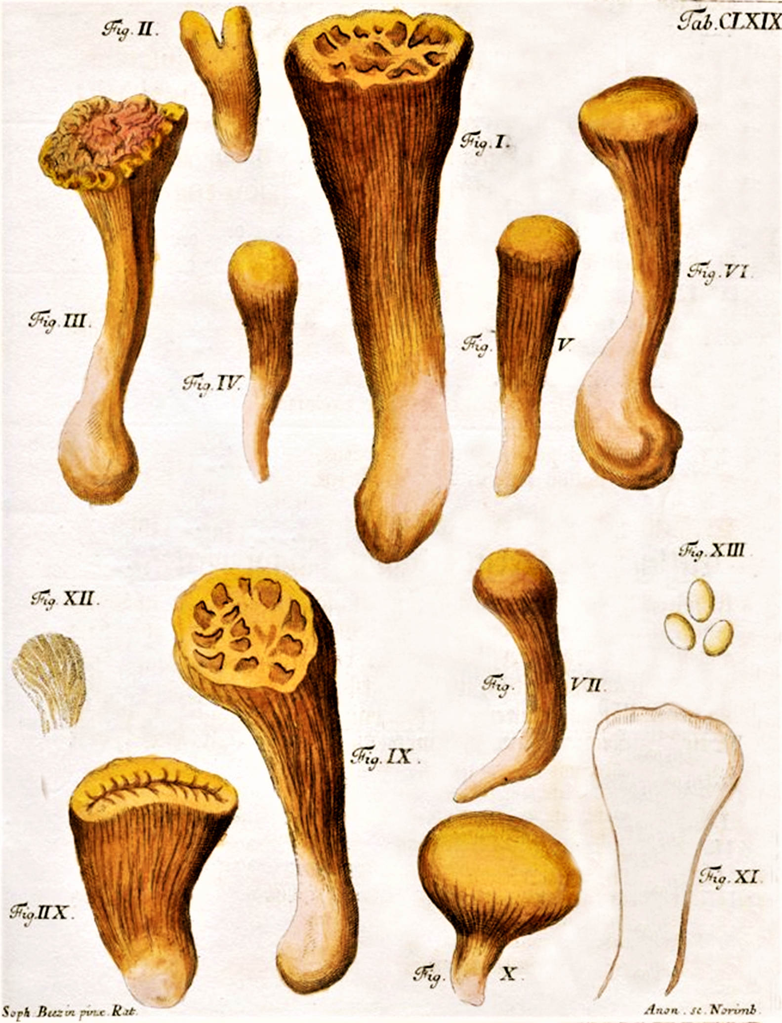 Schaeff.: Clavaria herculanea, heute Clavariadelphus pistillaris (L. (1753) Donk (1933)